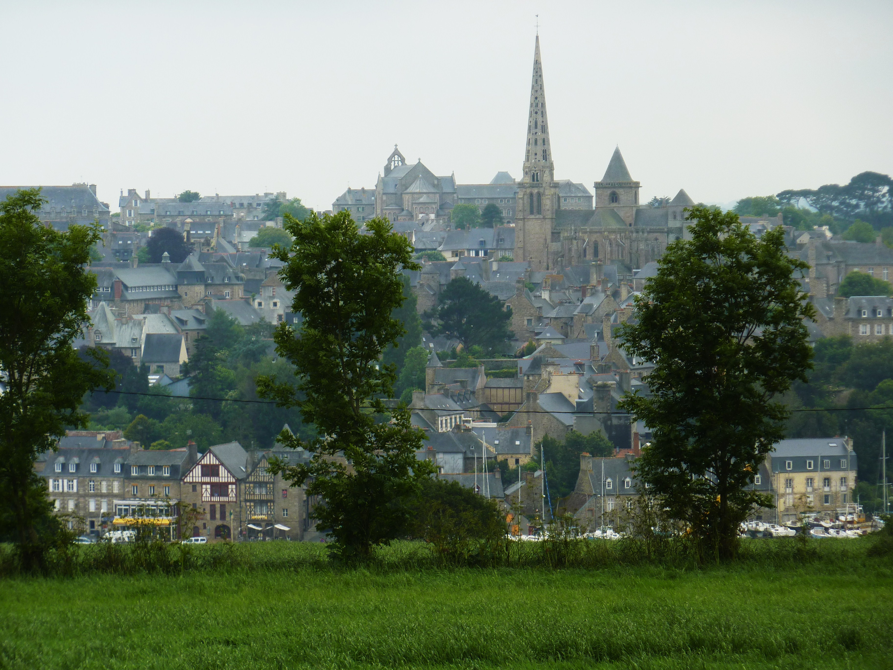 Tréguier : la ville vue de l'autre rive du Jaudy